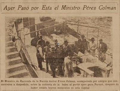 Ministro Perez Colman de visita